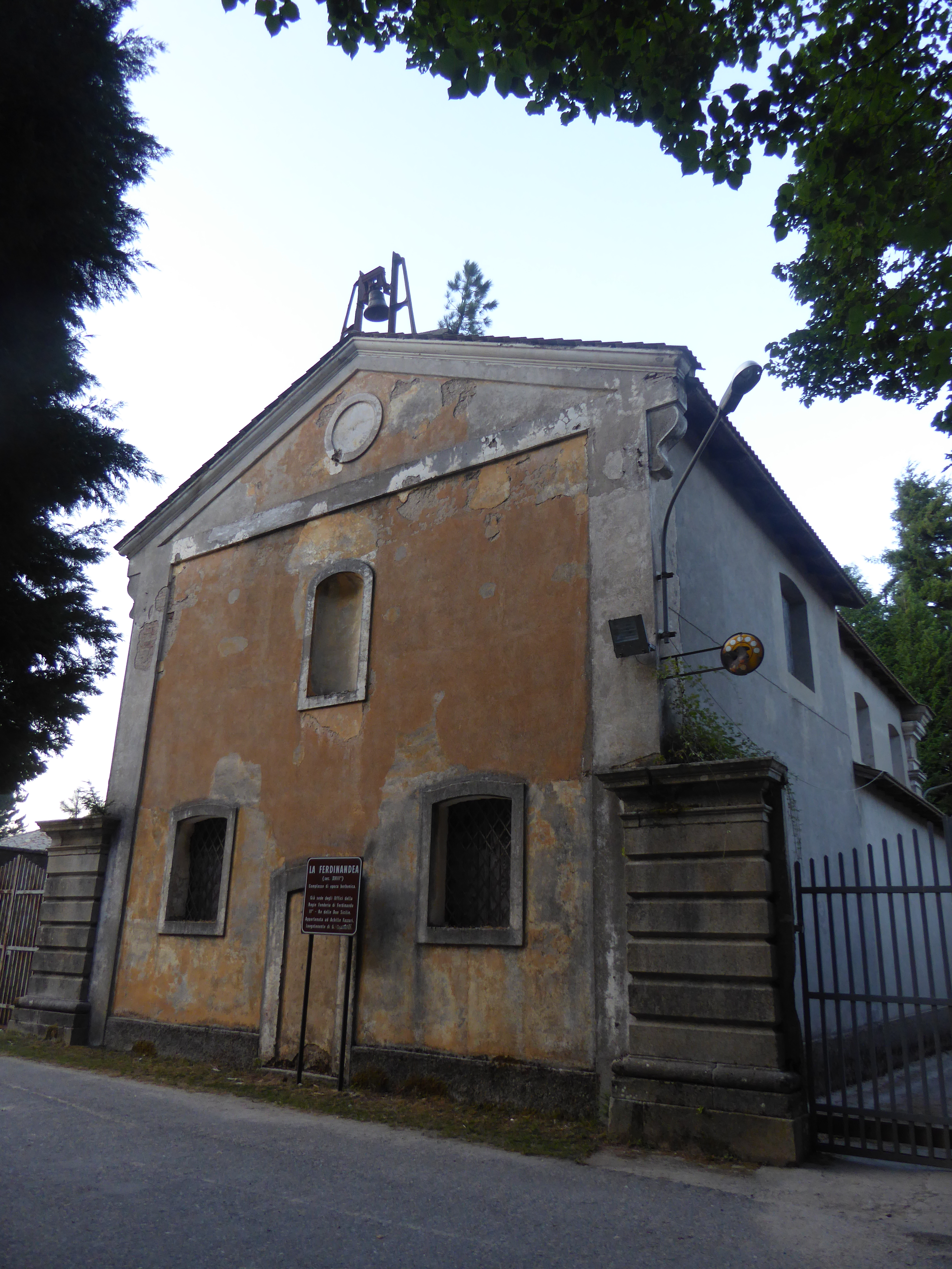 Chiesa di Ferdinandea (agosto 2019)